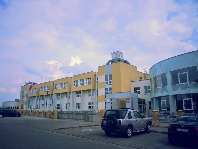 szkoła ponadgimnazjalna